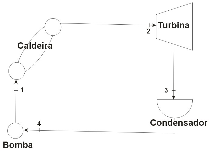 Imagem de um ciclo rankine estilizado